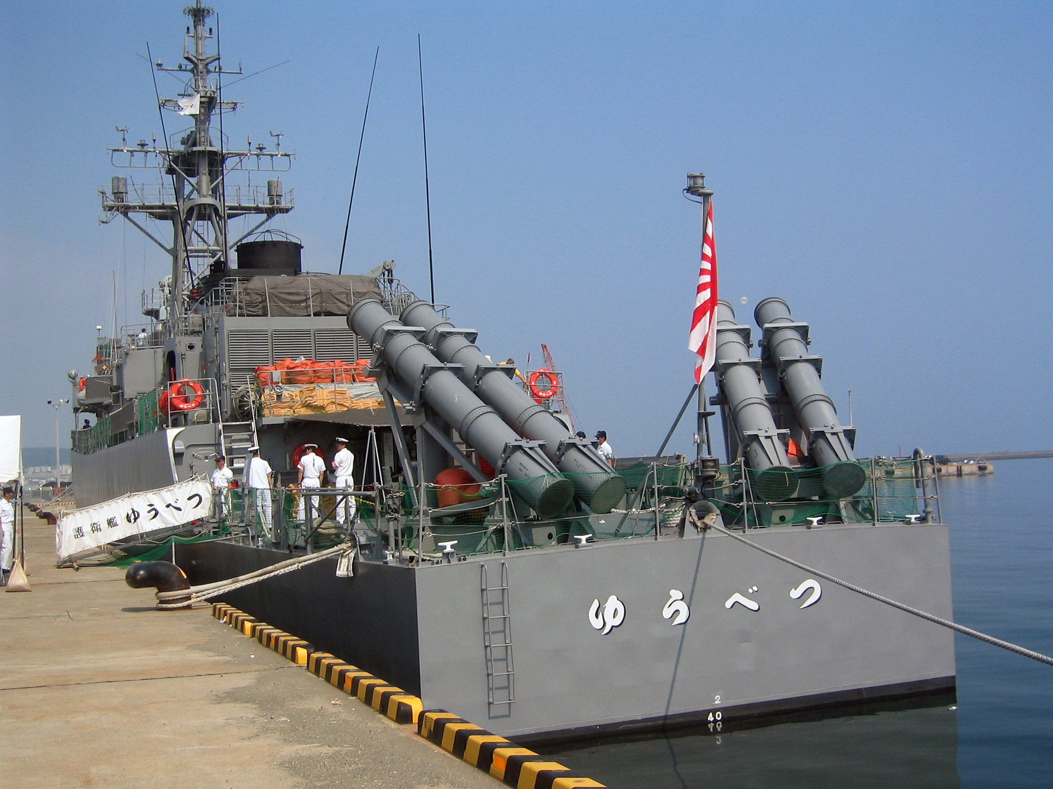 護衛艦ゆうべつ